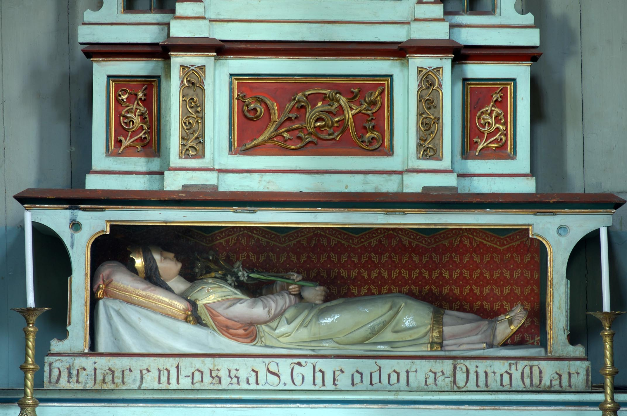 sarkofág s pozostatkami sv. Teodory panny a mučenice